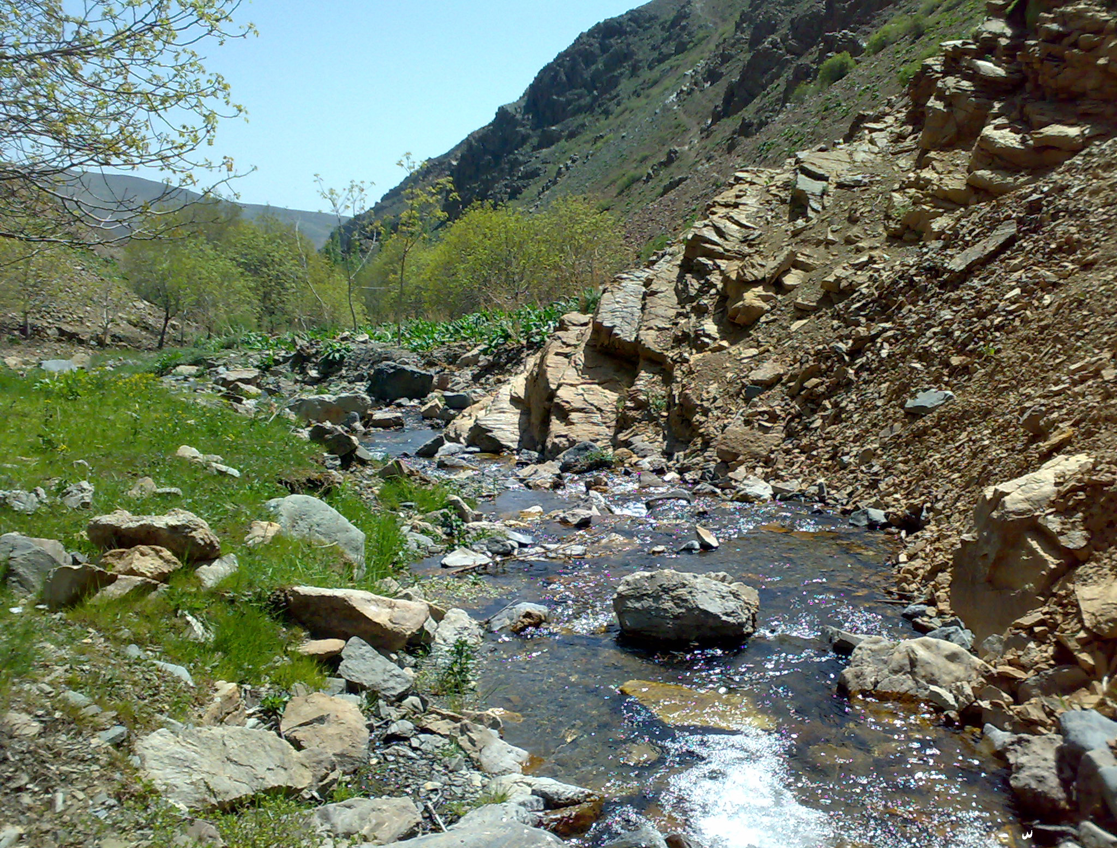 مسیر رودخانه شهر درود